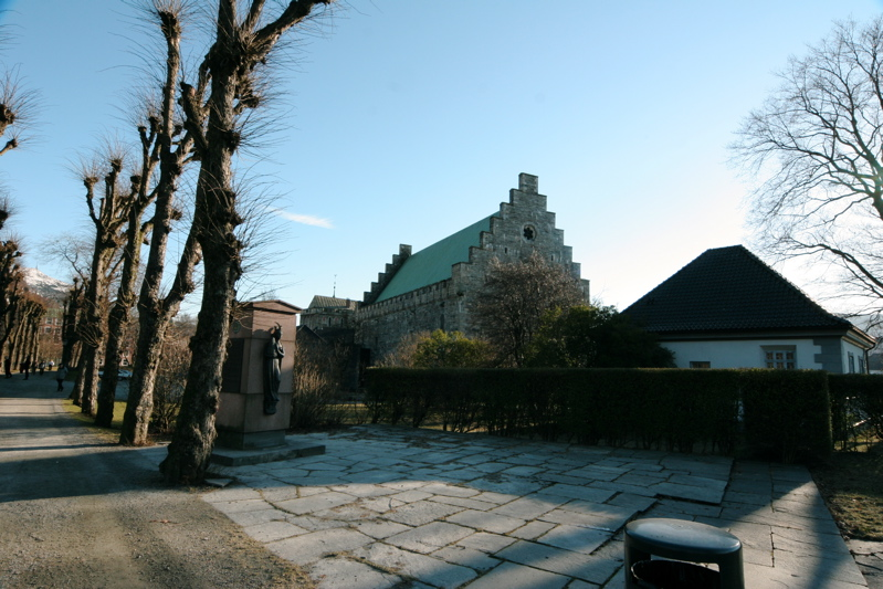 Parkanlegget på Bergenhus med grunnplan av Kristkirken. Foto Nina Aldin Thune